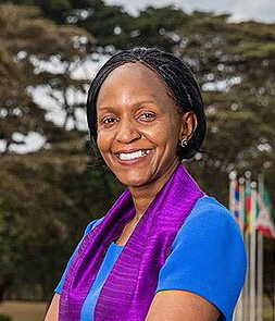 Joyce Msuya Mpanju, stellv. Exekutivdirektorin des Umweltprogramms der Vereinten Nationen UNEP 2019